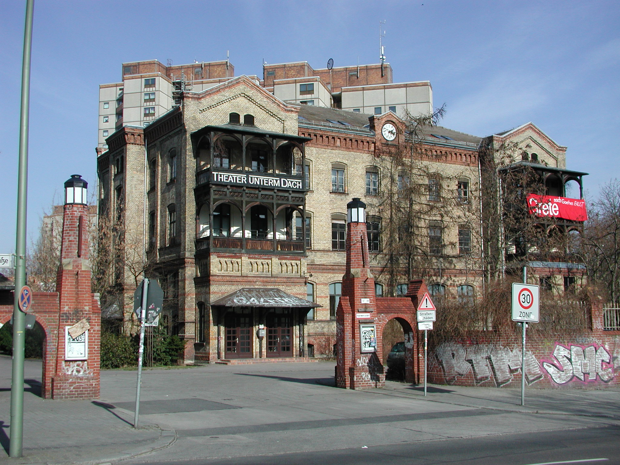 Theatergebäude in Prenzlauer Berg